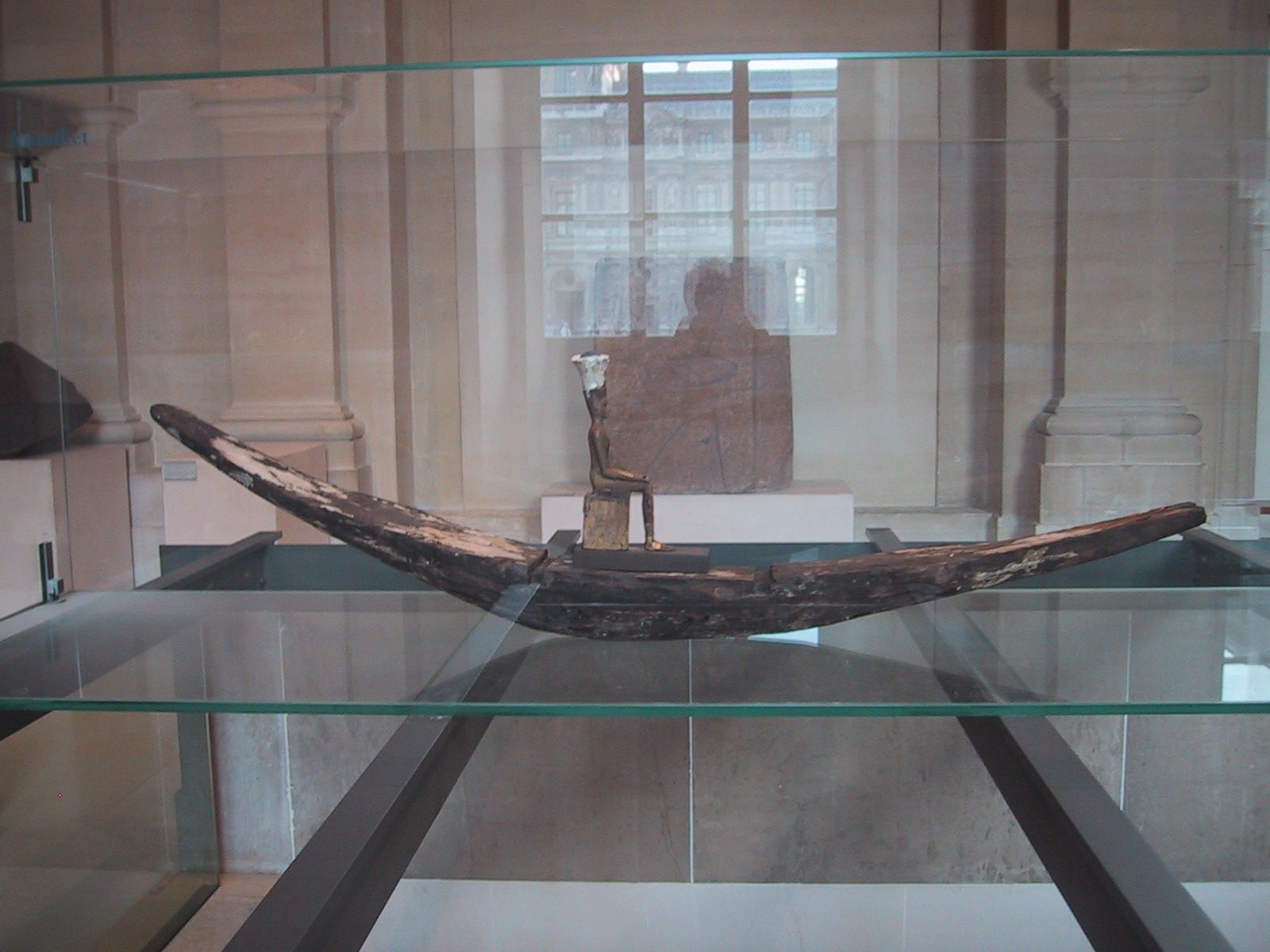 Barque de procession de le déesse Anouket. XIXème dynastie thébaine, vers 1250 avant J.C. Bois autrefois peint, trouvée à Éléphantine.